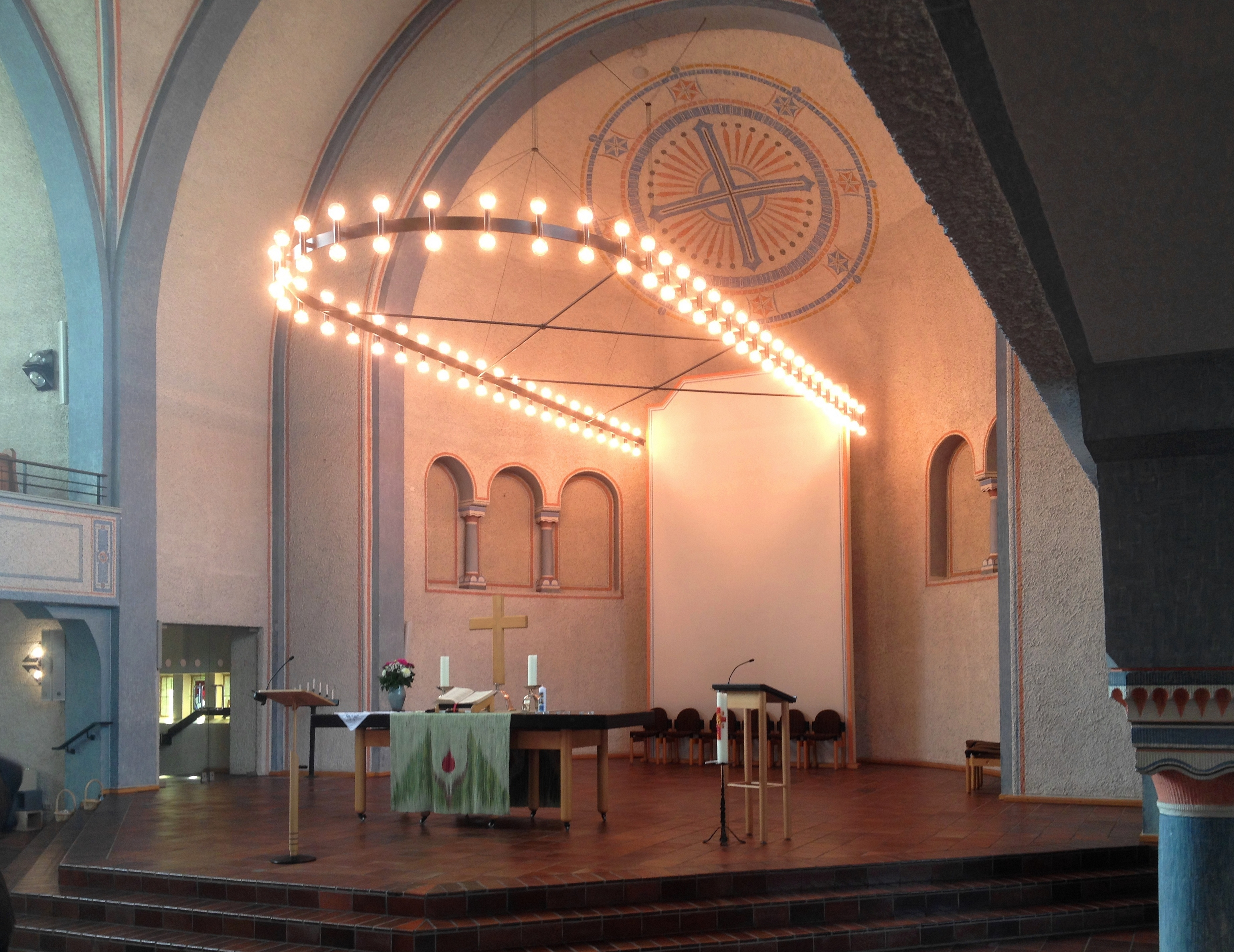 Langenfeld, evang. Erlöserkirche